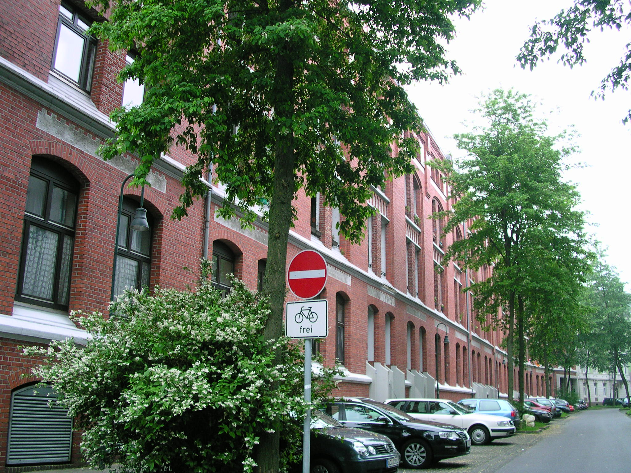 Aachen, ehemalige Delius-Fabrik an der Deliusstraße, bis zum Konkurs 1932 Aachens größte Textilfabrik C. Delius mit bis zu 1000 Beschäftigten. Nach dem 2. Weltkrieg Lebensmittelproduktion, Abriß in den 1980er Jahren durch Proteste verhindert. Wohnungen waren wegen der nicht zu den Fenstern passenden Wohnungs-Geschoßhöhen schwer zu planen.